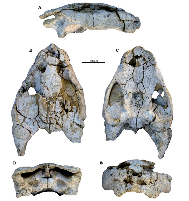 Photographs of the skull of eucryptodiran turtle Angolachelys mbaxi gen. et sp. nov. (MGUAM−PA 002) from the Turonian of Iembe, Angola; in left lateral (A), dorsal (B), ventral (C), posterior (D), and anterior (E) views.